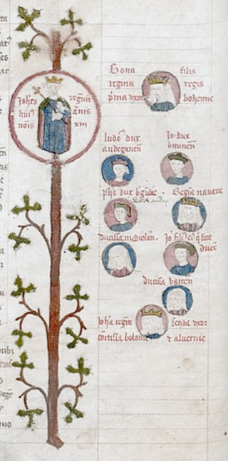 Arbre généalogique